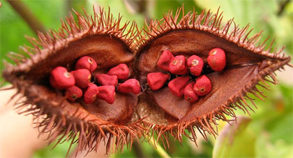 Аннато